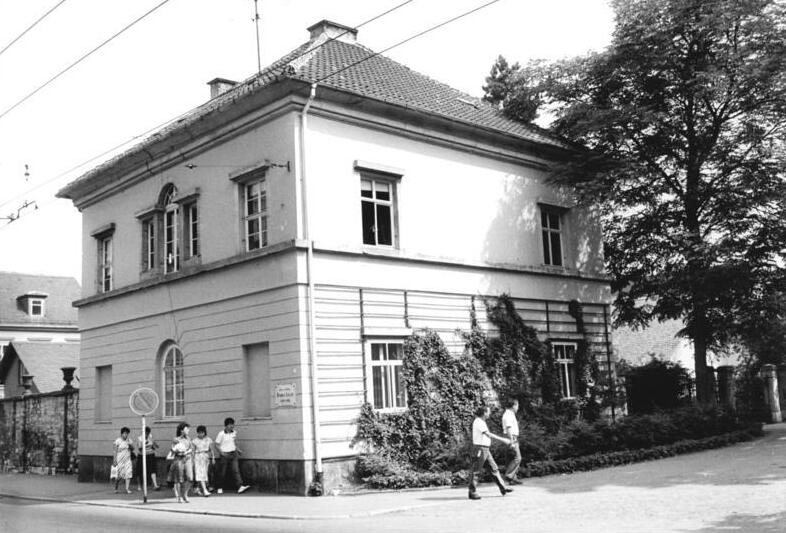 Weimar, Liszt-Gedenkstätte ADN-ZB Ludwig-25-7-86 Bez. Erfurt: Zum 100. Todestag von Franz Liszt (31.7.1986)- In diesem Haus am Rande des PArkes an der Ilm befindet sich seit 1956 im Erdgeschoß eine Liszt-Gedenkstätte. Hier lebte der ungarische Komponist und Pianist zeitweilig ab 1861. Zuvor wae er ab 1848 bereits zehn Jahre als Hofkapellmeister im Weimar tätig gewesen. Der am 22.10.1811 in Dodorjan bei Sepron geborenen Künstler machte sich in Weimar um die Pflege der neuen oper verdient. Er war Lehrer und Vorbild einer bedeutenden Pianistengeneration. (siehe 18 u. 19N)